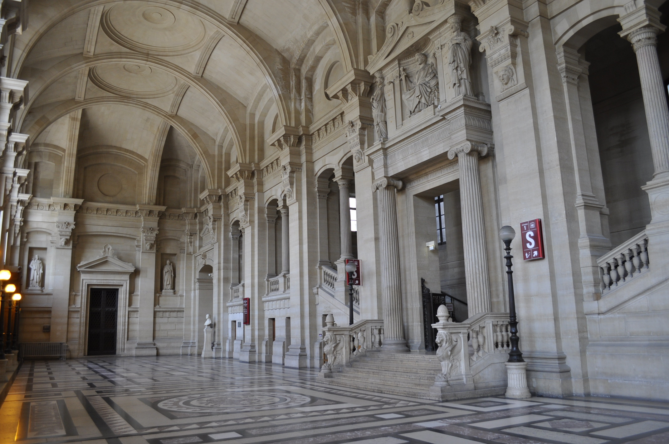 Vestibule de Harlay du Palais de justice de Parus .